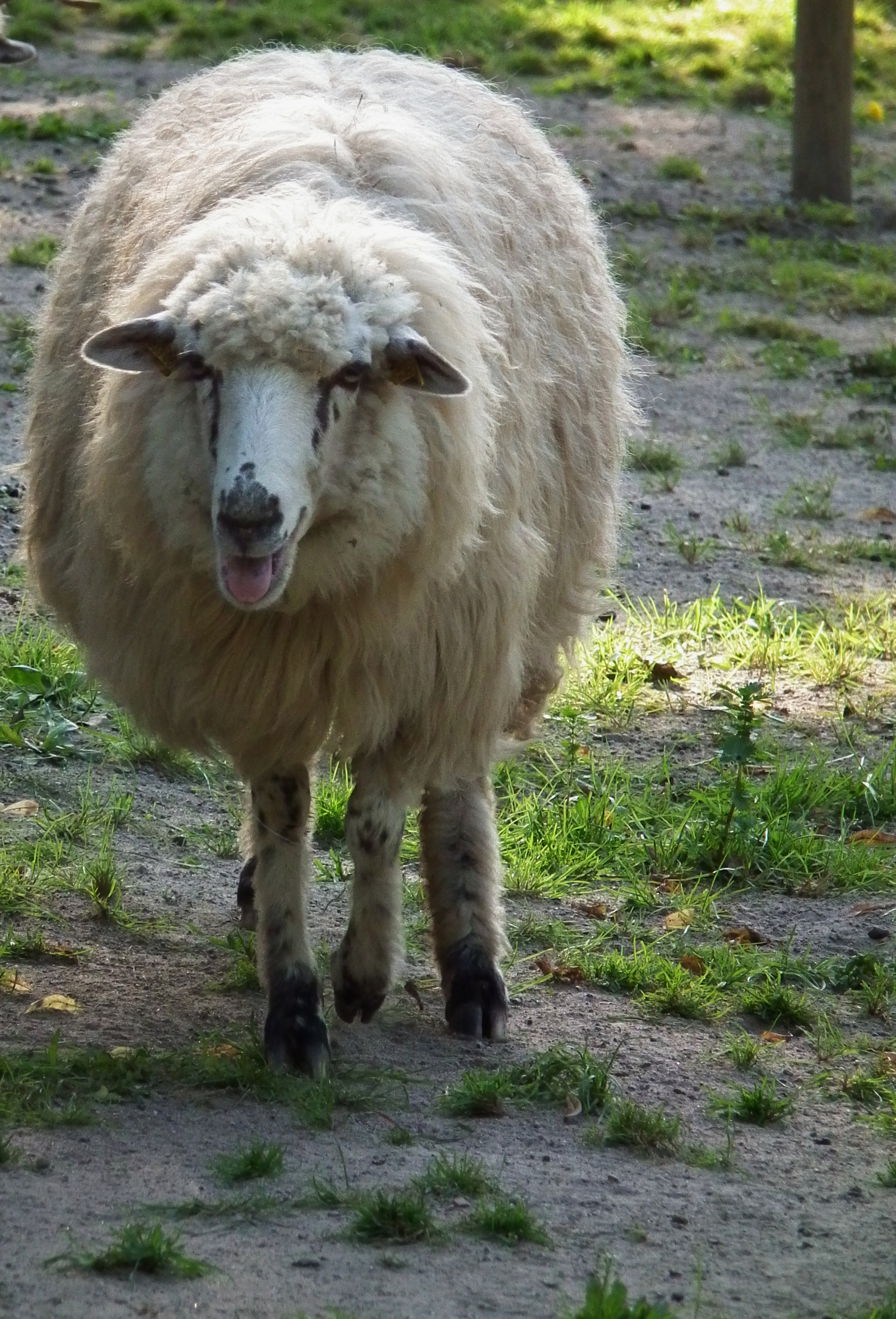 Walachenschaf im Tiergarten Worms (Rheinland-Pfalz, Deutschland)